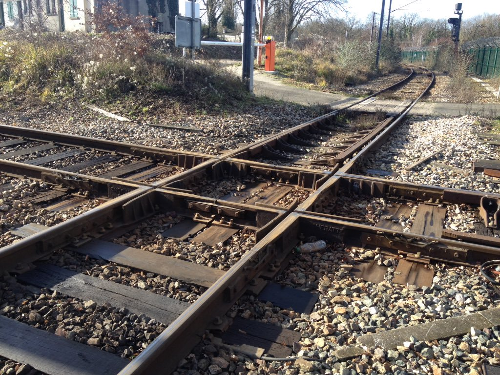 Appareil de voie très peu répandu en France sur des voies ferrées. Il permet le croisement perpendiculaire de voies. Ce croisement ferroviaire est situé près d'Achères, France